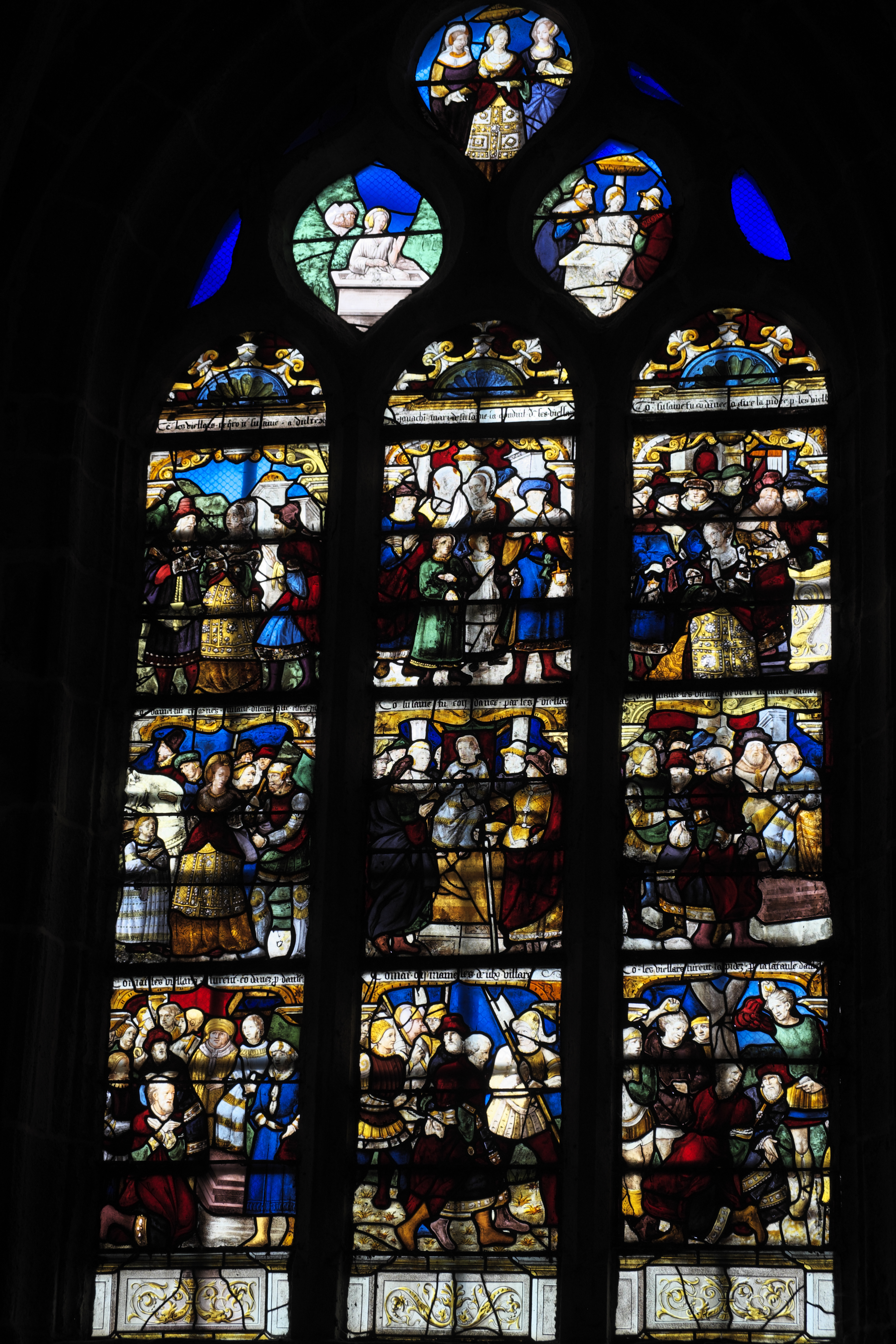 Katholische Pfarrkirche Saint-Ouen in Les Iffs im Département Ille-et-Vilaine (Region Bretagne/Frankreich), Bleiglasfenster (baie 4) um 1535 bis 1540, Darstellung: Suzanna und die Greise